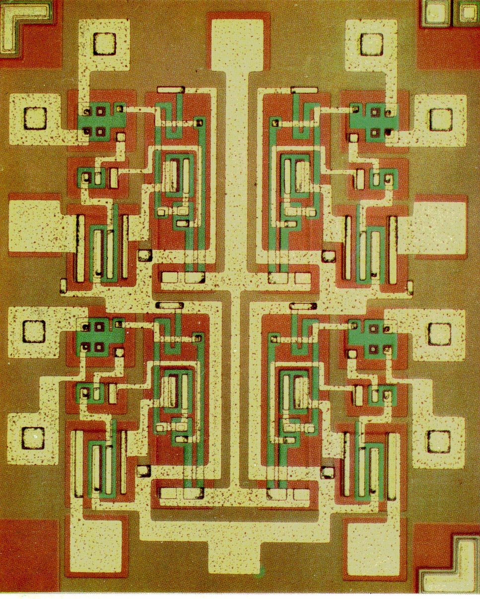 NAND-Gatter mit 4 Eingängen in Transistor-Transistor-Logik; 7 Transistoren auf dem Chip, kleinste Strukturbreite 20µm (siehe Radio Fernsehen Elektronik 10/1990, S. 649)